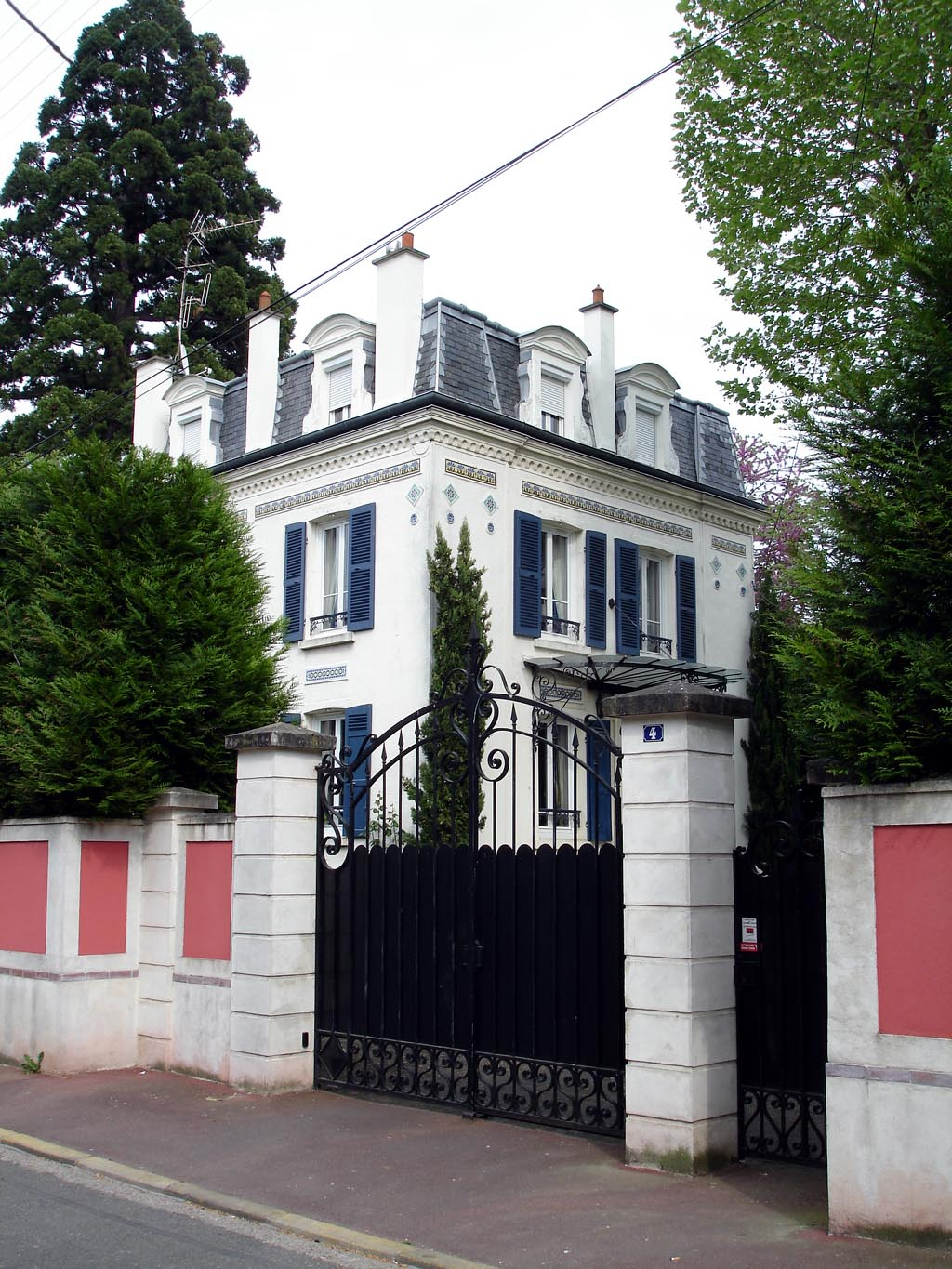 Maison de Paul Eluard, rue Hennocque à Eaubonne (Val-d'Oise), France Résidence de l'écrivain où il accueillit Max Ernst en 1923 qui décora l'intérieur de la demeure. Avril 2007 Photo personnelle (own work) de Clicsouris